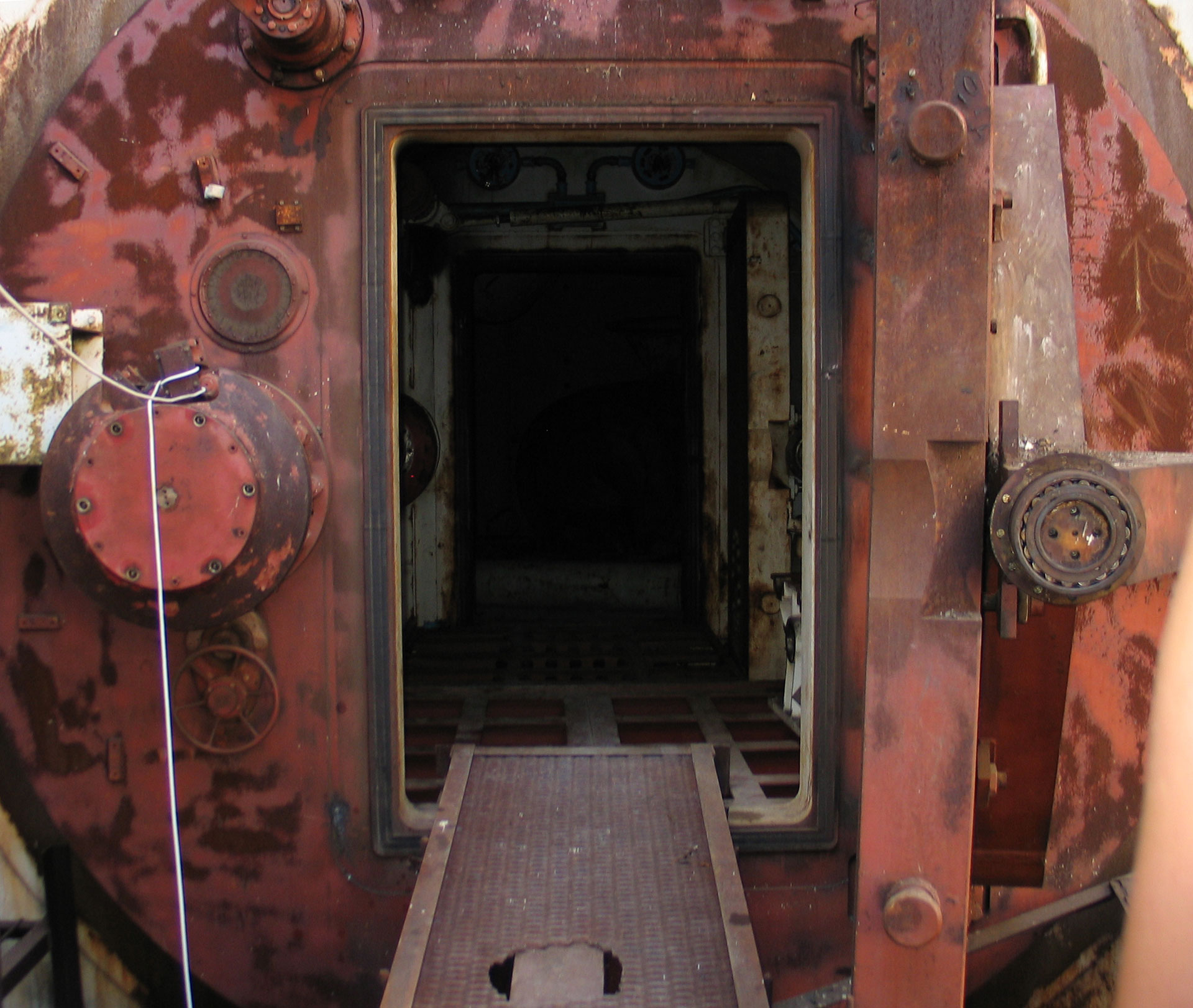 Крымская АЭС. Верхний вход в гермоблок